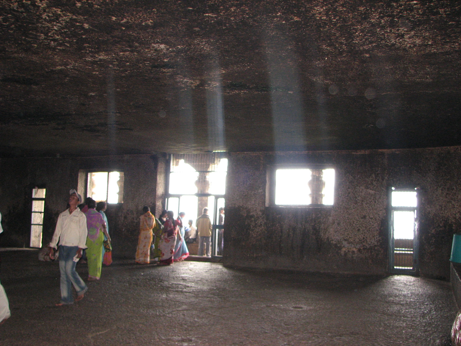 Lenyadri interior